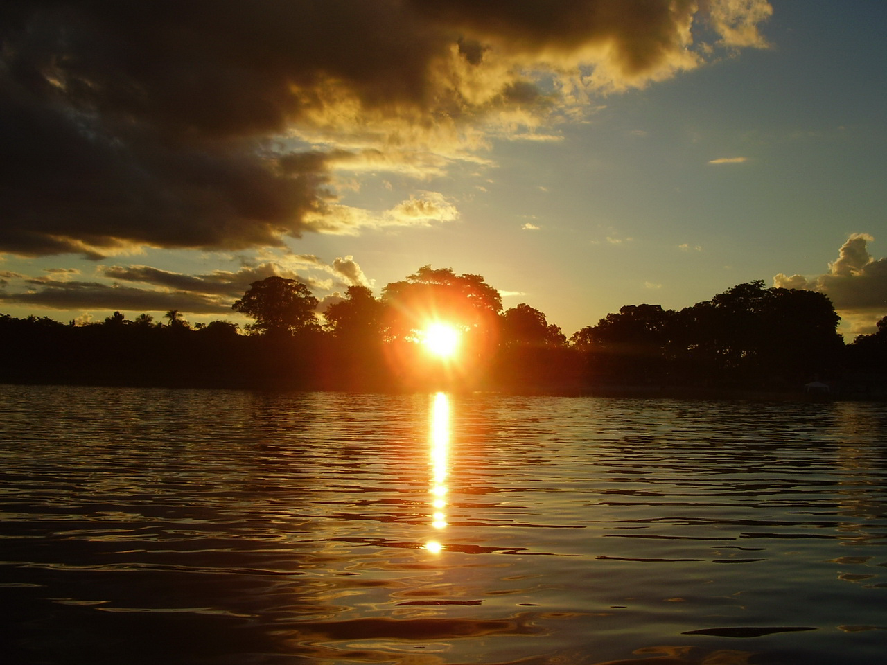 Fotos de los refugios y reservas de Itaipu, tomadas en los años 2007 y 2008 por mí